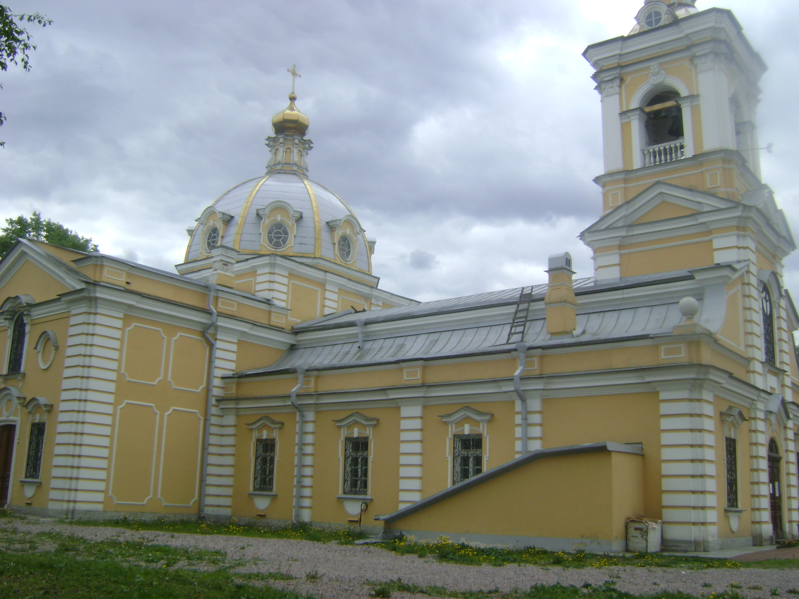 Троицкая церковь в Красном Селе (Санкт-Петербург)